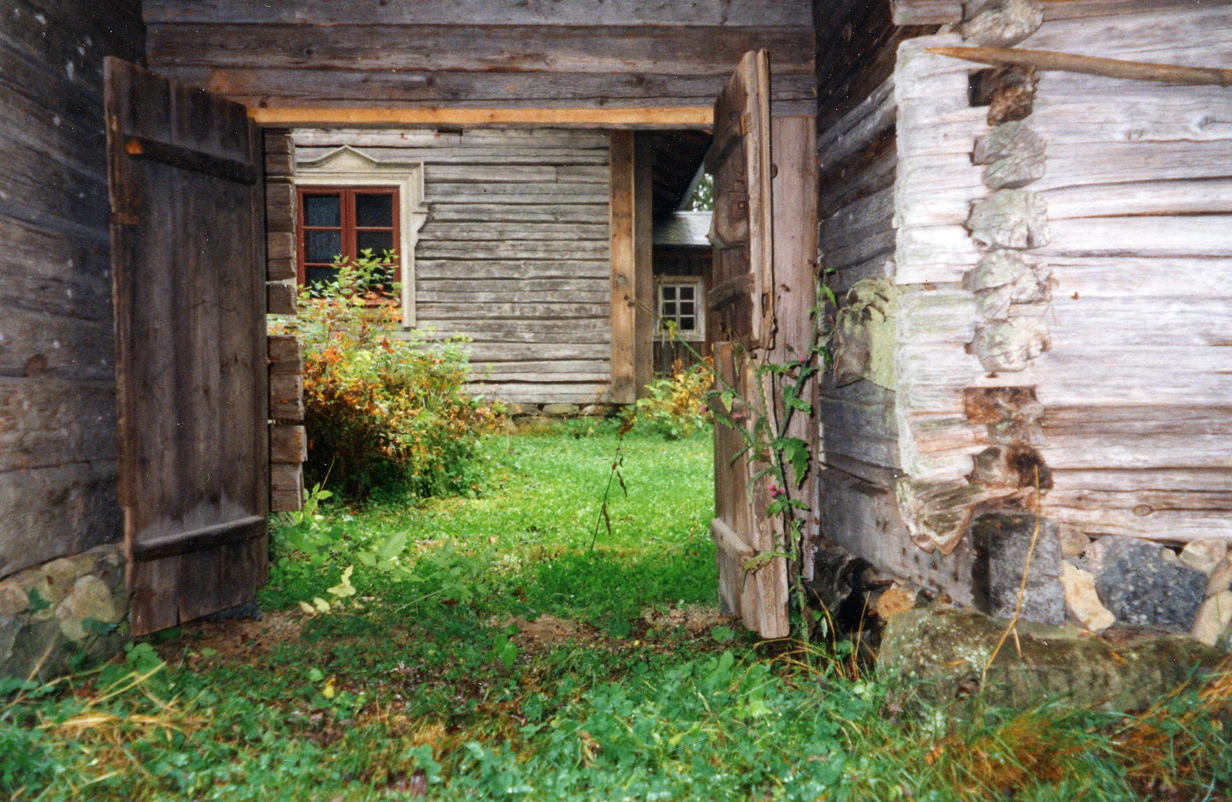 Jalomäen umpipihan susiportti